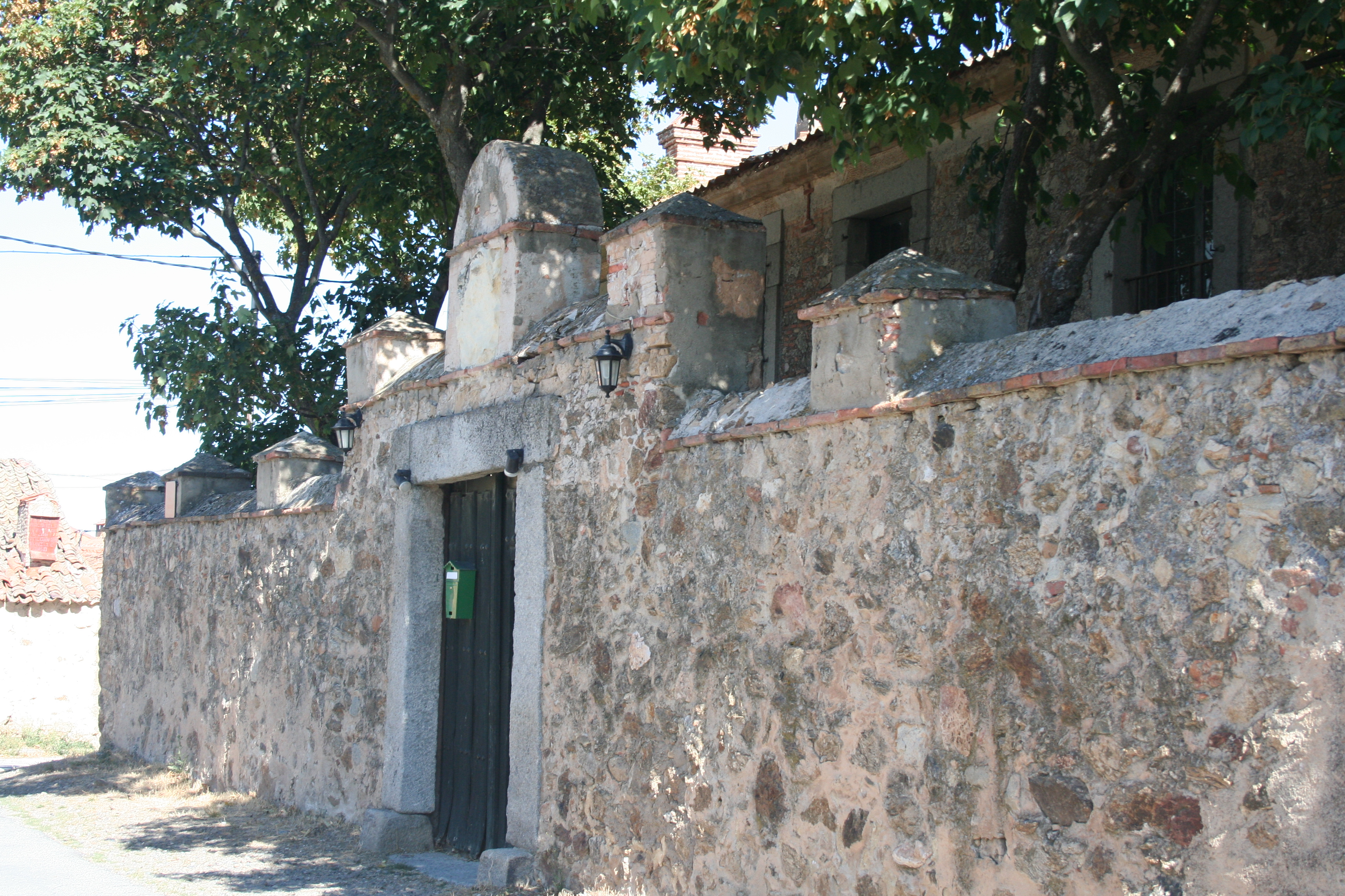 Entrada suroeste de la Casa del Esquileo (Torrecaballeros Cabanillas del Monte, Segovia, España)